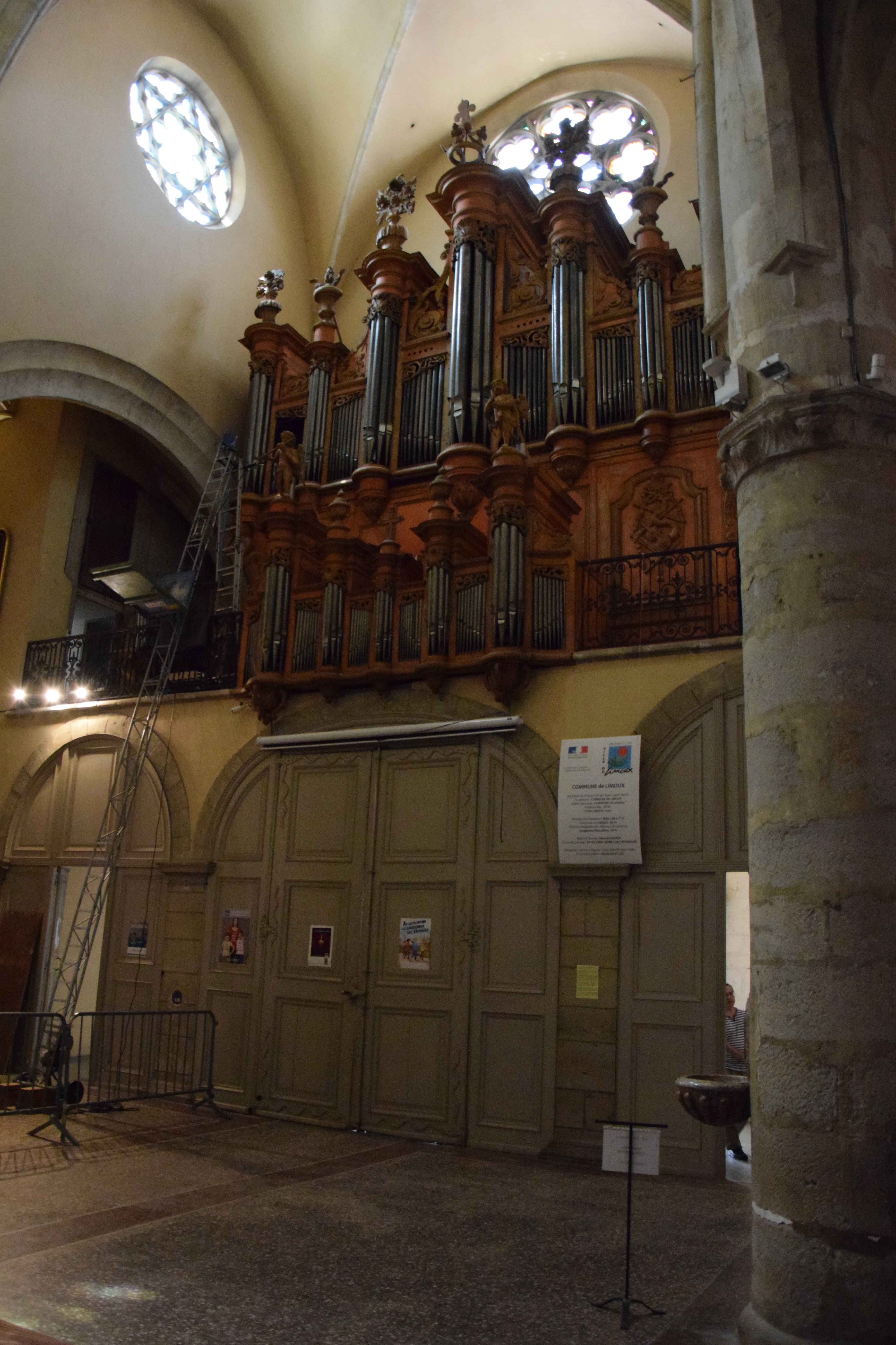 Église Saint-Martin de Limoux